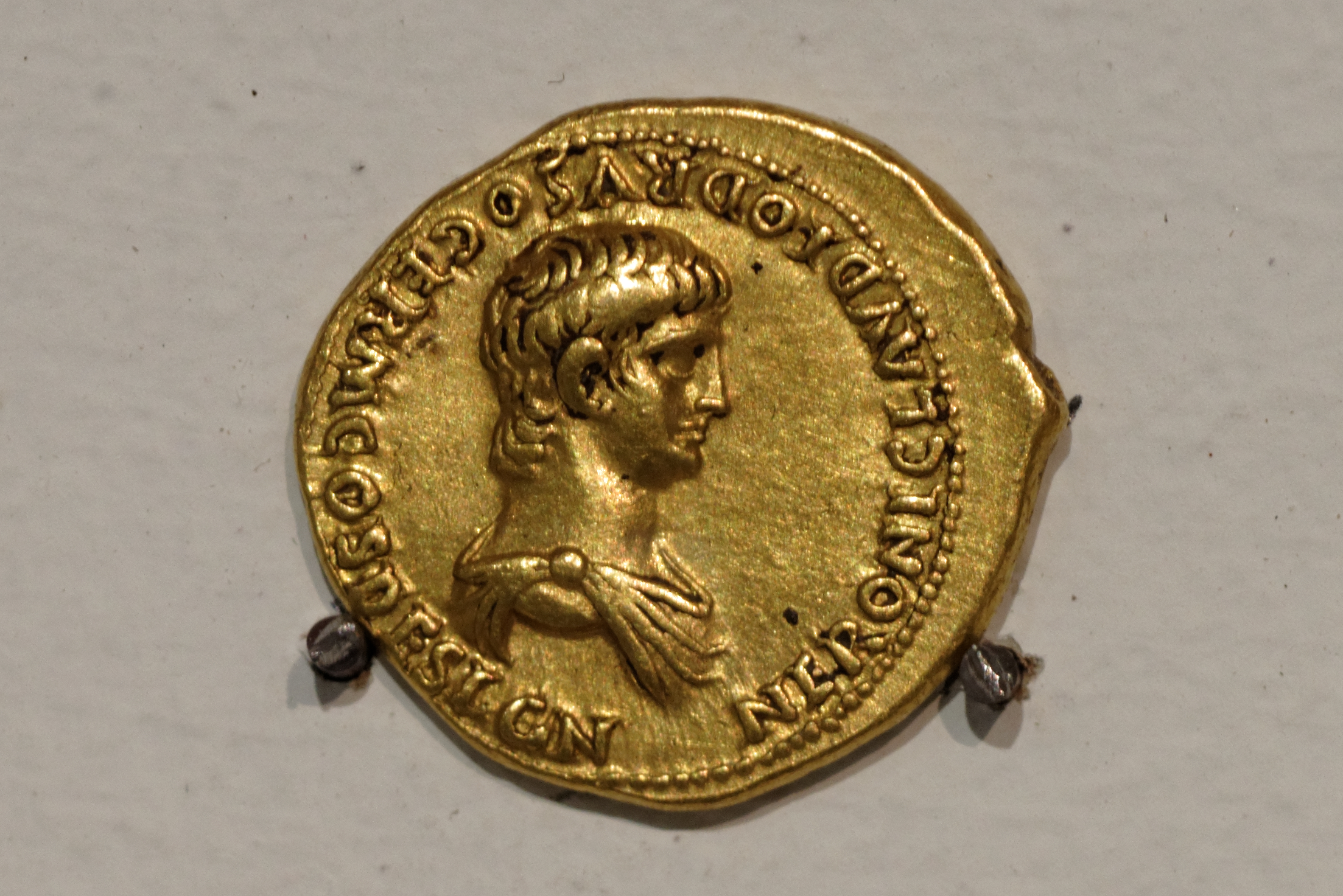 Aureus de Claude. Atelier de Lyon (?). Après 50 ap. J.C. D/ NERONI CLAVDIO DRVSO GERM COS DESIGN Buste de Néron R/ EQVESTER/OR-DO / PRINCIPI/IVVENT. Inscrit sur un bouclier placé au sommet d'une lance. Musée des Beaux-Arts de Lyon, inv. X 618-16